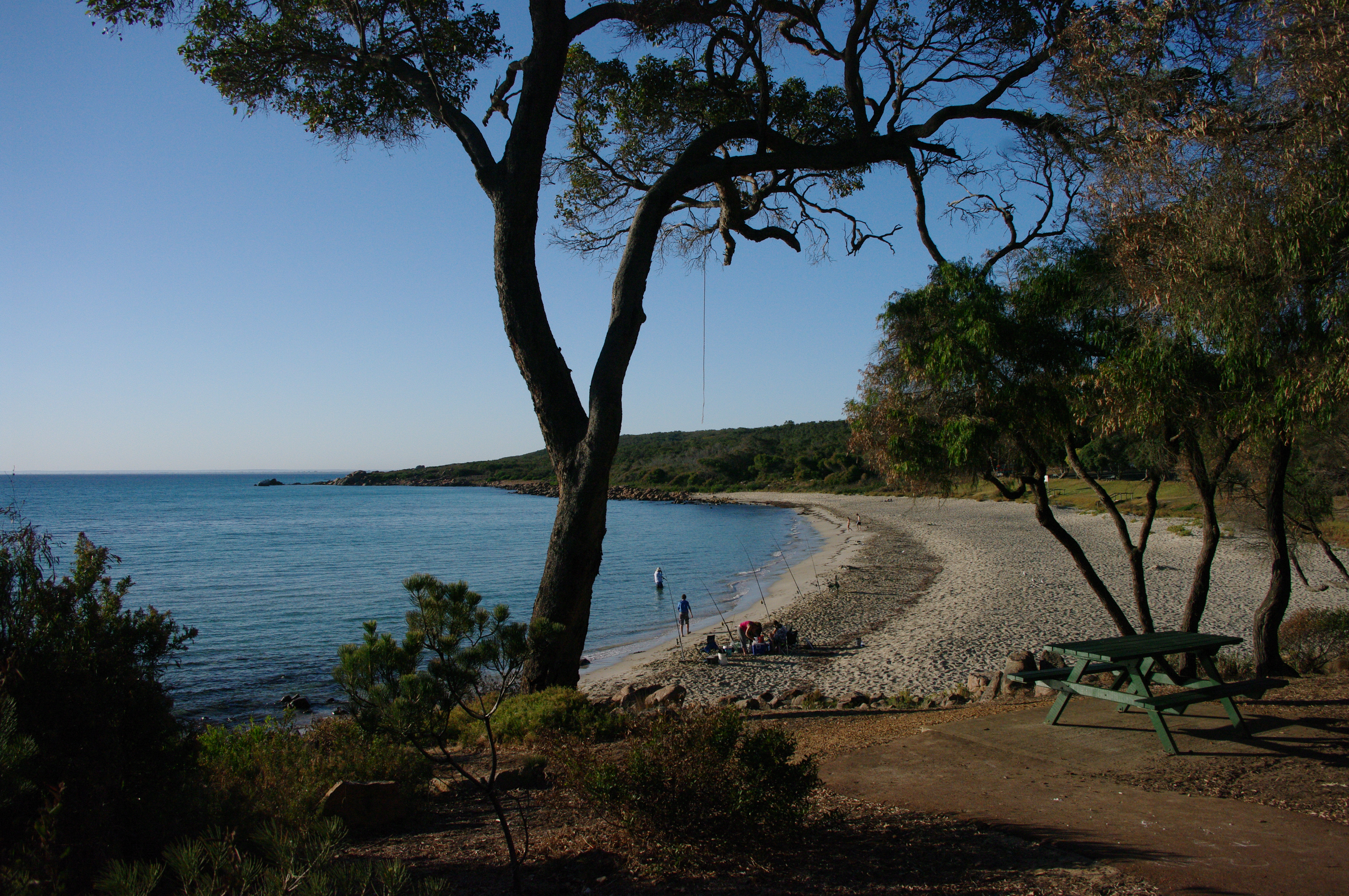 Meelup Beach